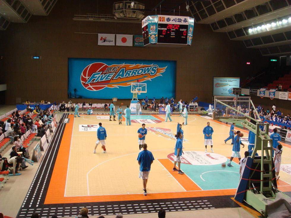 高松市総合体育館第1競技場（日本プロバスケットボールリーグ開催時）